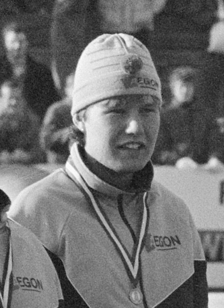 Marieke Stam